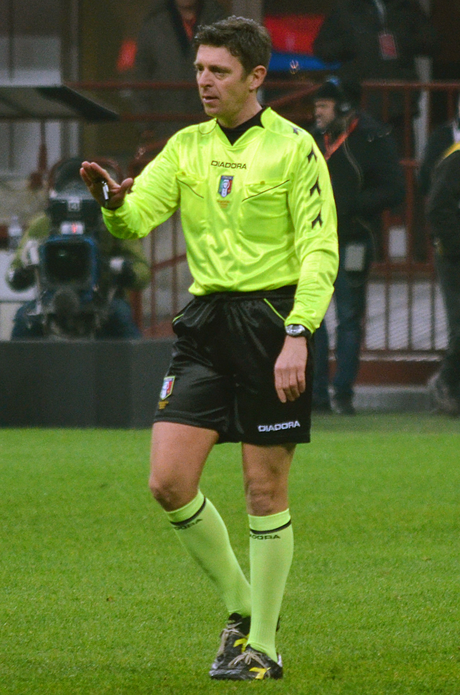 Milano, stadio Giuseppe Meazza, 27 gennaio 2015. L'arbitro di calcio italiano Gianluca Rocchi durante Milan — Lazio (0-1), quarti di finale della Coppa Italia 2014-15.